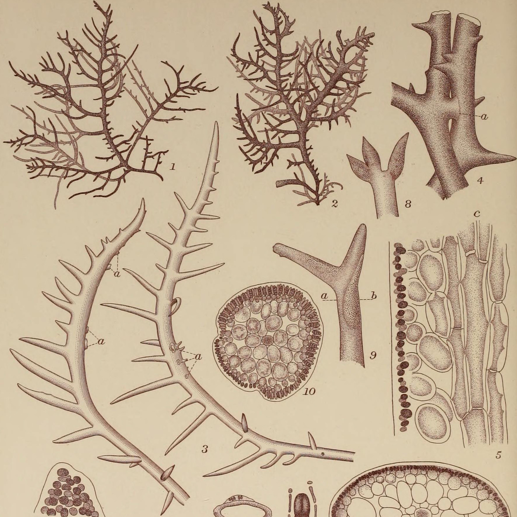 PLLVII. 14- 6 4 5 Hypnea saidana Holmes Peyssonzielia involvens Zanard. B 6 Fig. 1-10.